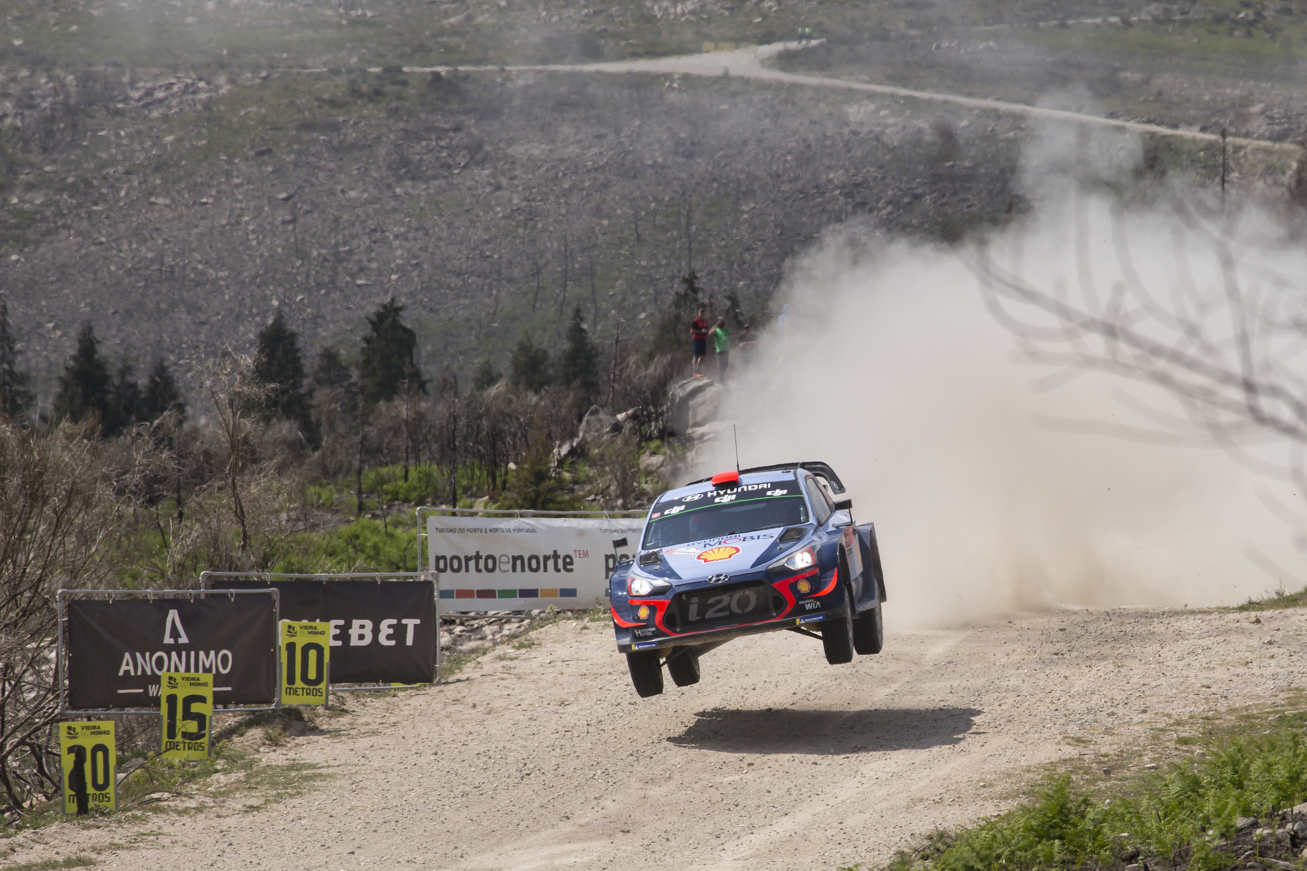 Rajd Portugalii 2018